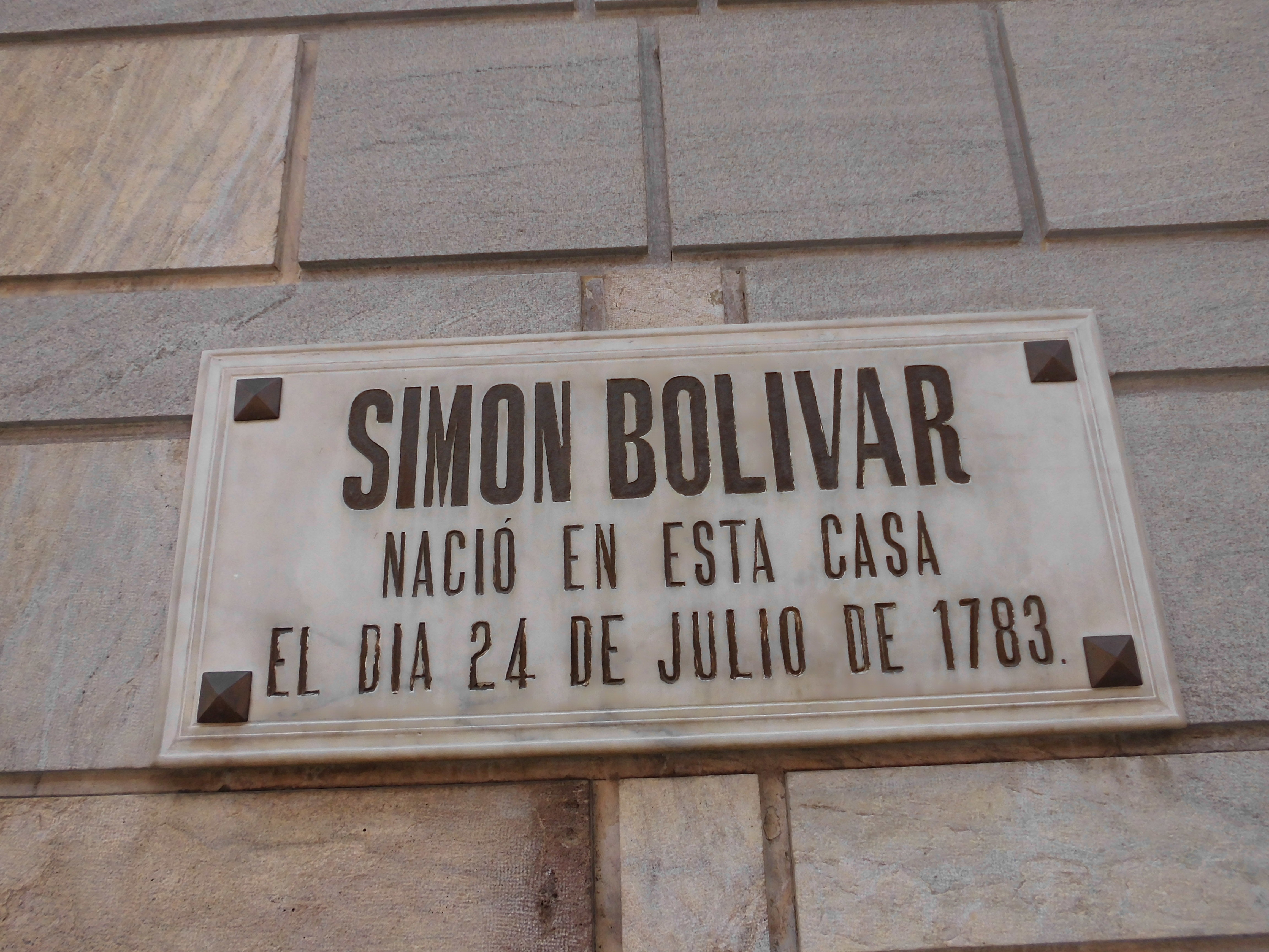 placa en la fachada de la casa natal del Libertador de América Simón Bolívar.